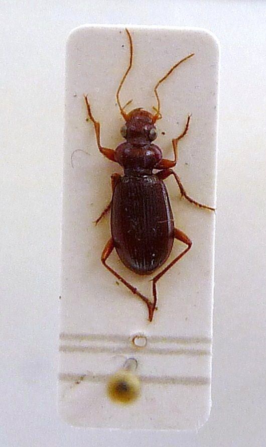 Gewöhnlicher Bartläufer (Leistus ferrugineus)